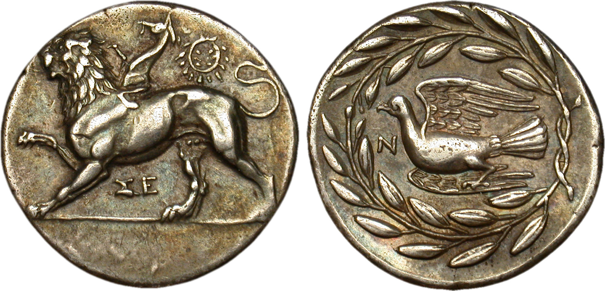 Métal : argent Diamètre : 23,5mm Axe des coins : 12h. Poids : 12,27g. Description avers : Chimère passant à gauche. Légende avers : SE Description revers : Colombe volant à droite ; le tout dans une couronne d'olivier. Légende revers : N